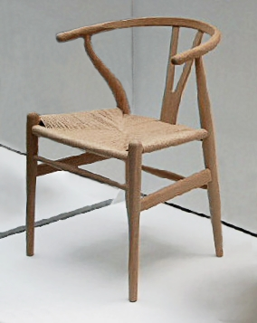 Y-stoel of vorkbeenstoel van Hans Jørgensen Wegner; model CH 24; 1950